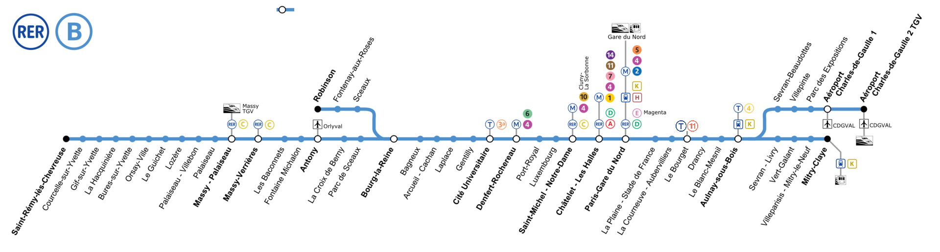 Ajout de la correspondance avec le T11 express